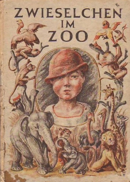 Werner Bergengruen Zwieselchen im Zoo. Mit vielen farbigen Bildern von Karl Mahr, Stuttgart: Verlag Thienemann, 1935